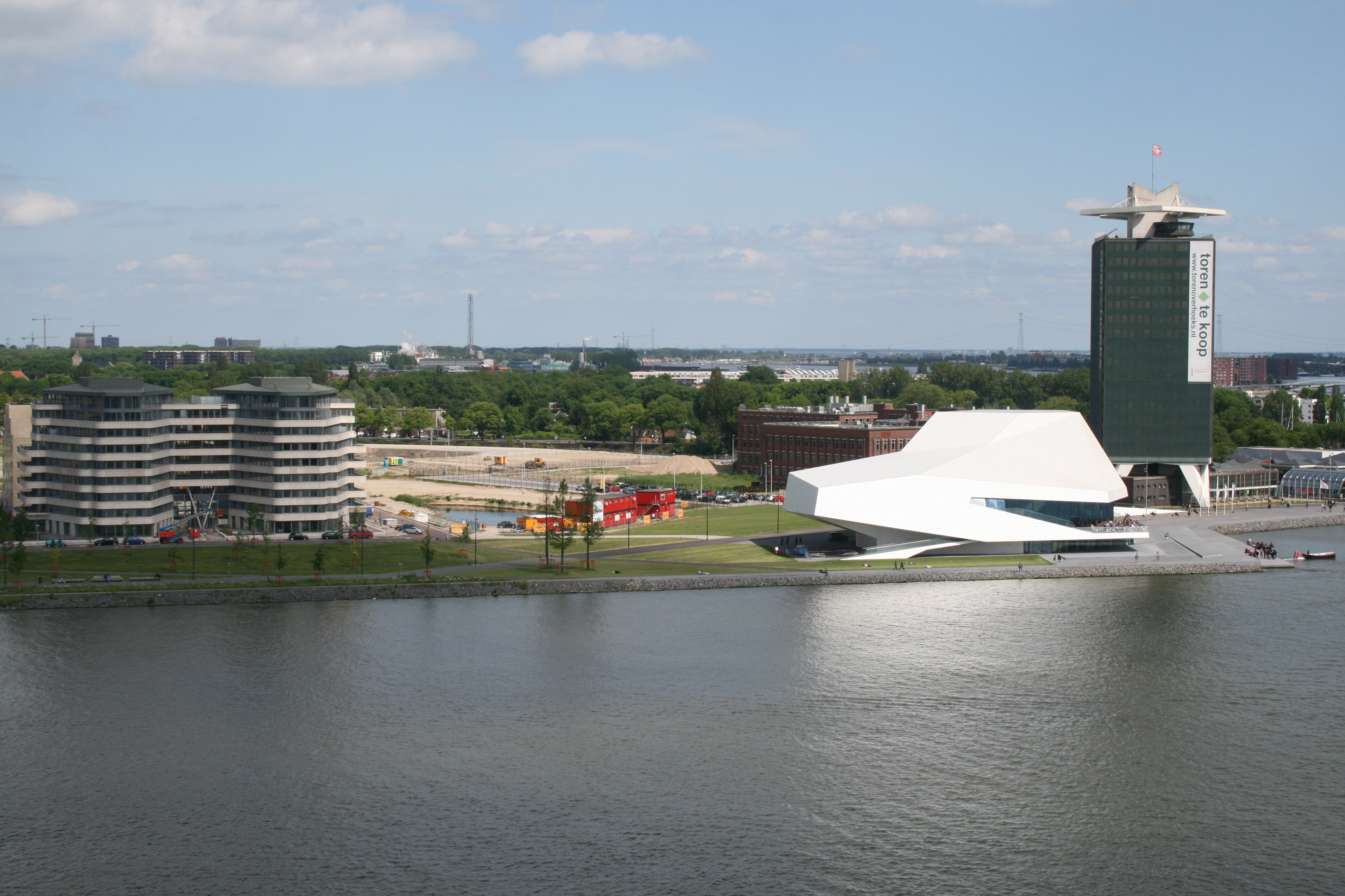 Overhoeks, Amsterdam-Noord: woongebouw De Zeven Provinciën, EYE Film Instituut en voormalige Shell toren gezien vanaf gebouw IJdock, 2 juni 2012EYE Film Instituut en voormalige Shell toren gezien vanaf gebouw IJdock, 2 juni 2012.